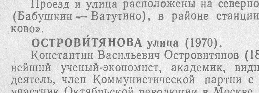 Фргмент из книги Ефремов Г.К., Крылов В.Н., Патушинская М.Г. и др. Имена московских улиц / Под общ бред. А.М.Пегова. — М.: Московский рабочий, 1985. — С. 268. — 462 с. с указанием ударения в топониме «улица Островитянова»